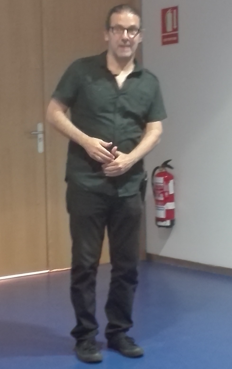 Físico teórico José Edelstein en una charla en la Casa de las Ciencias de Logroño